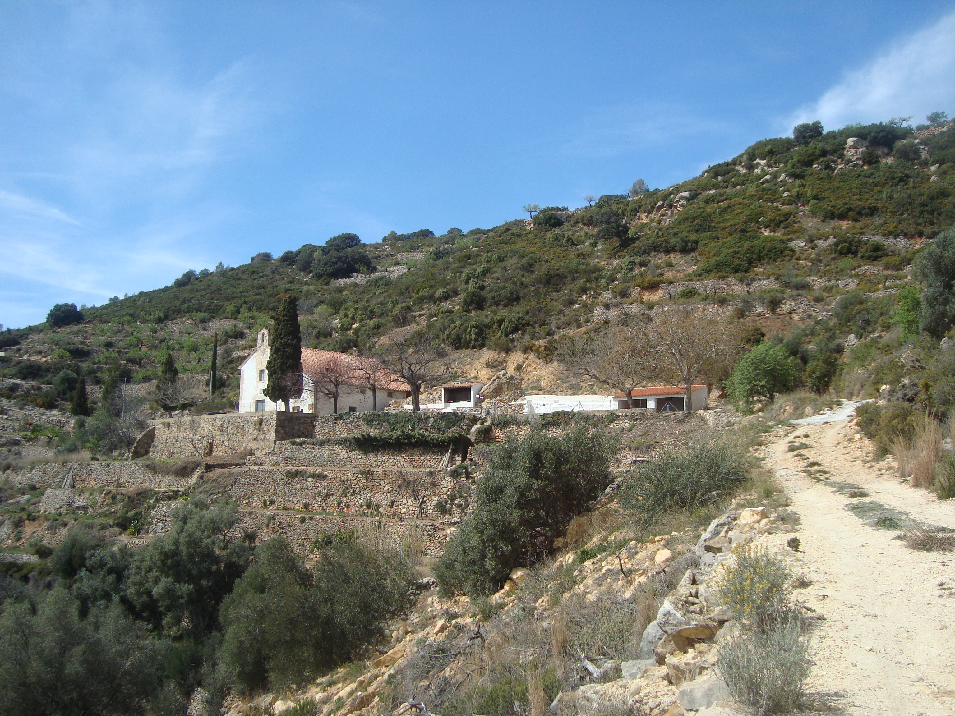 Ermita de Sant Miquel Arcàngel (la Serra d'en Galceran) 05.105-003.